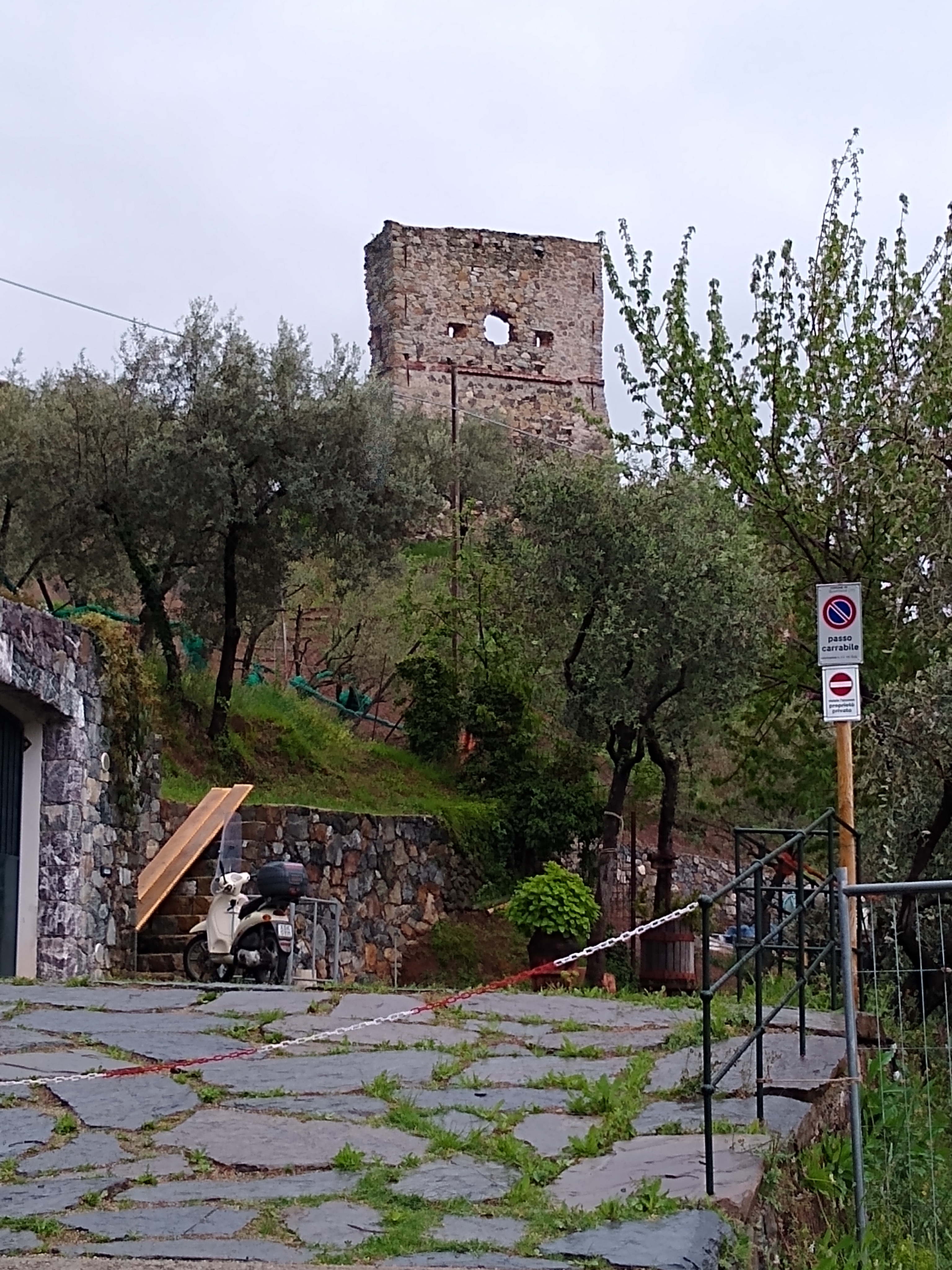 Manufatto difensivo, costruito dai Bonassolesi a partire dal 1544 e così chiamato perché gli Ardoino erano a quel tempo i signori del luogo. Verso la metà del ‘600, a causa probabilmente di un cedimento del terreno, la torre andò parzialmente distrutta e successivamente parte delle pietre che la costituivano venne utilizzata per la costruzione del campanile della parrocchiale di San Giorgio. Il rudere é stato restaurato nel 2018